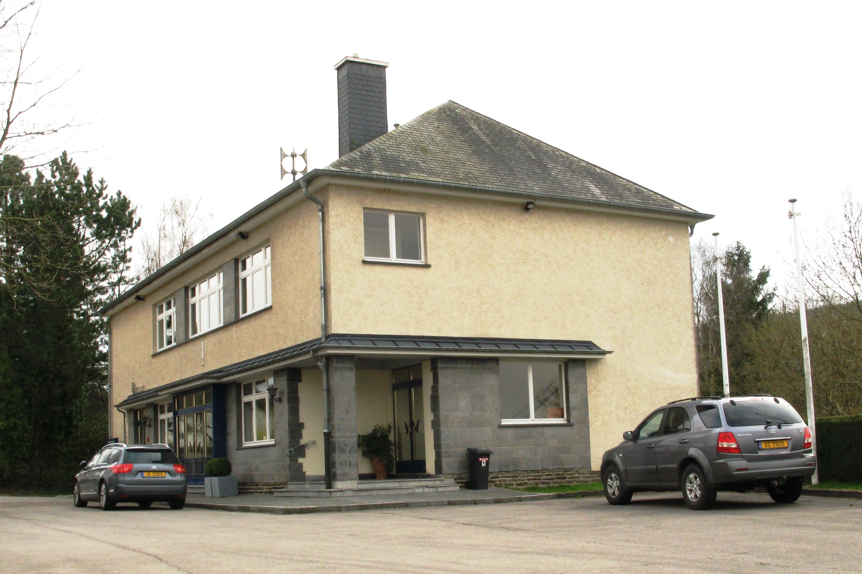 D'Néngsener Gemengenhaus zu Bommel. Gemengenhaus